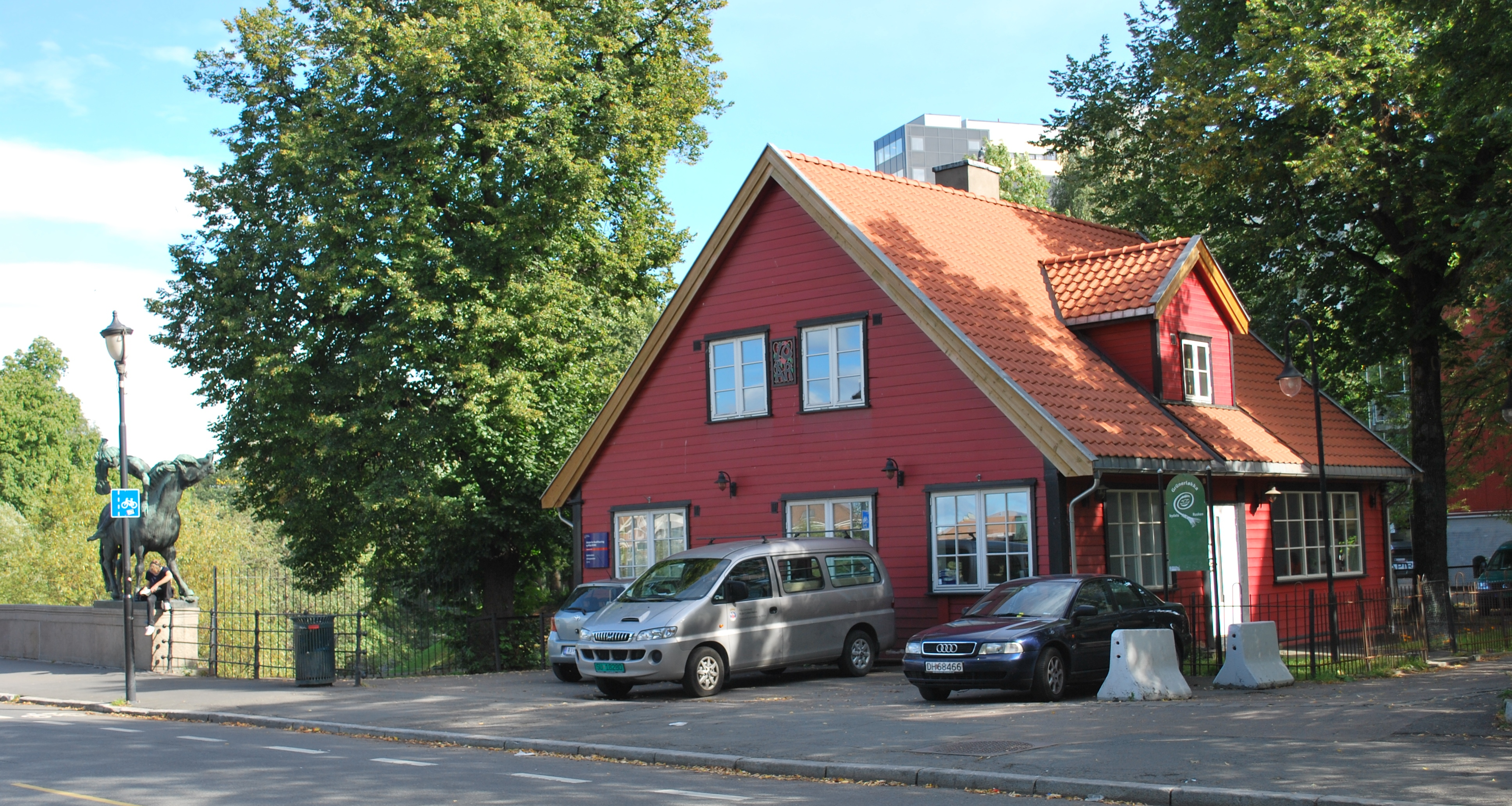 Østkantutstillingens bygning på Ankertorget i Oslo, bygget i 1926 av elever ved Fag- og forskolen. I dag brukes huset av Oslo kommunes Rusken-aksjon.